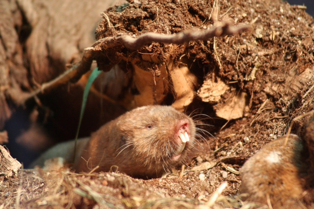 Sambischer Kleingraumull (Ansell-Graumull) (Cryptomys anselli) im Zoo Leipzig